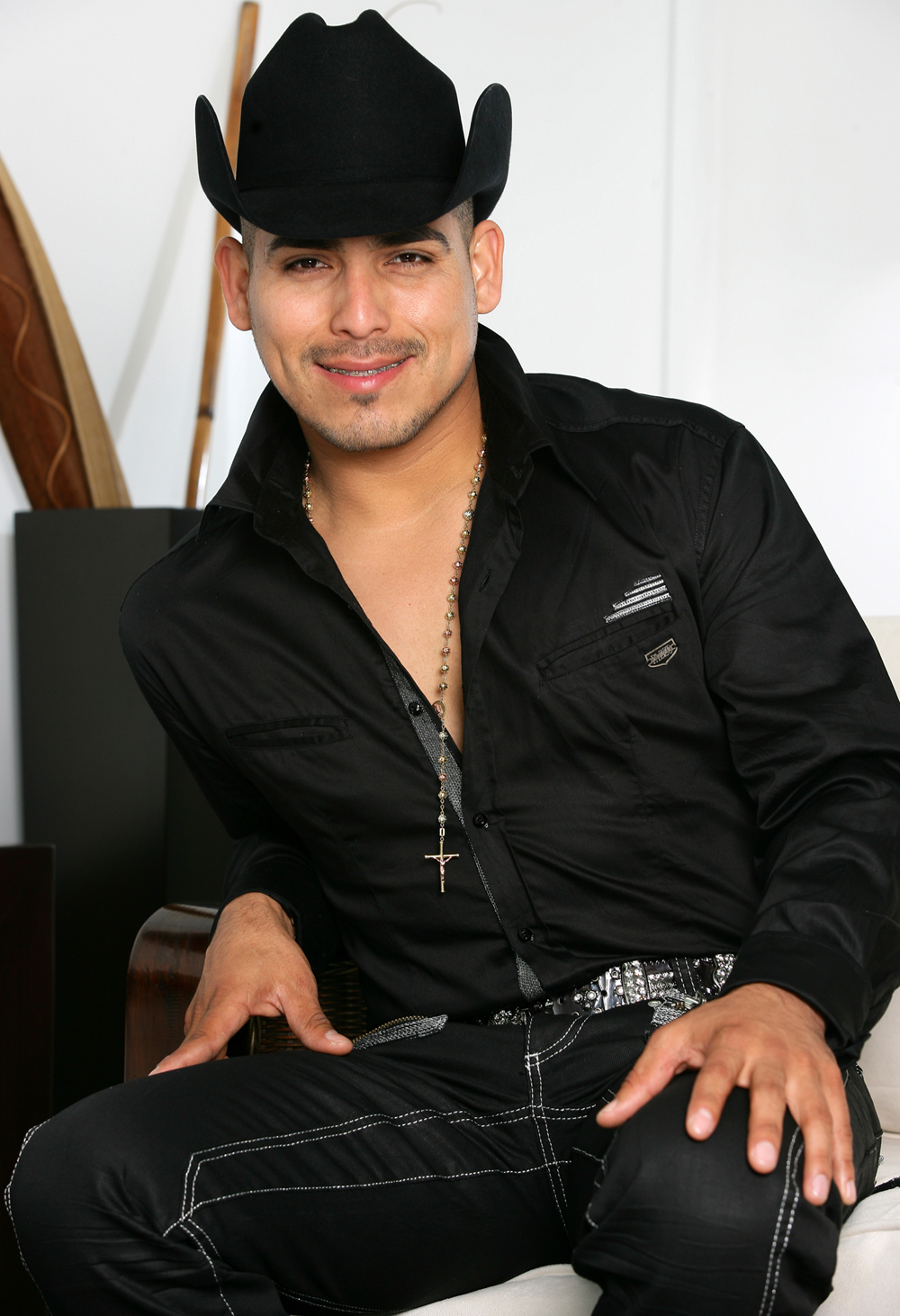 Espinoza Paz